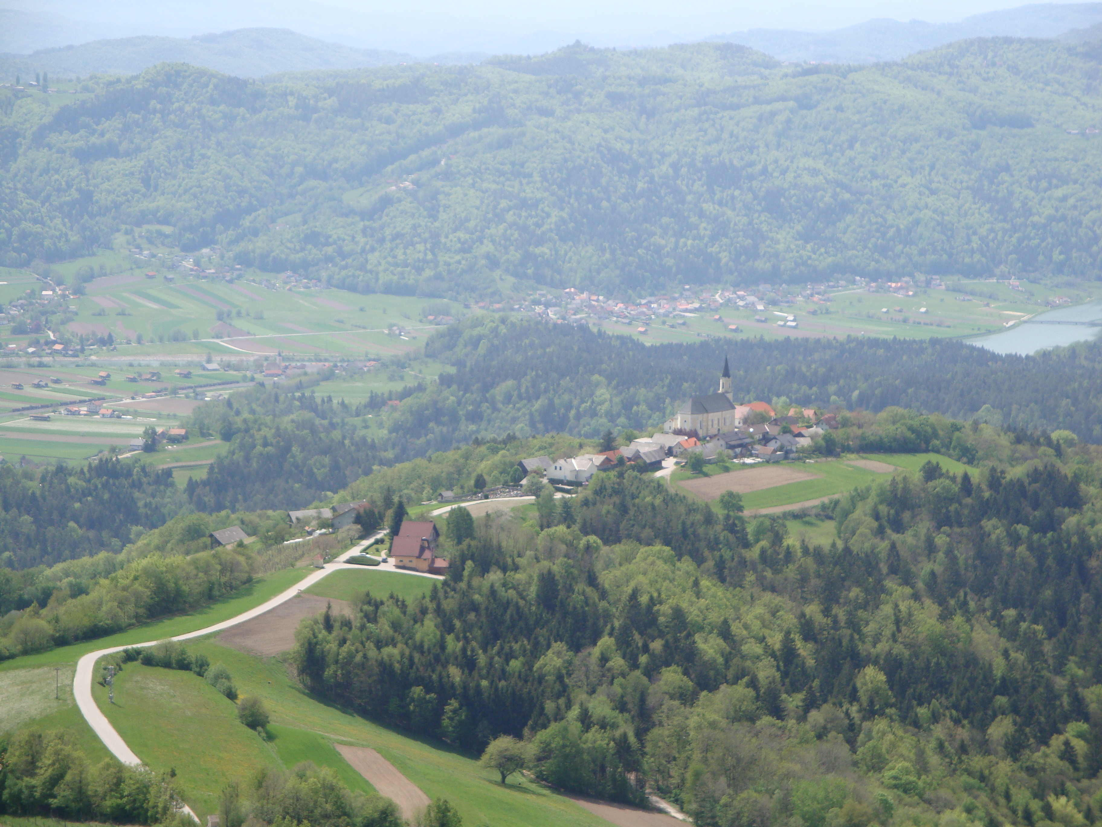 Razbor s poti na Lisco, Slovenija.